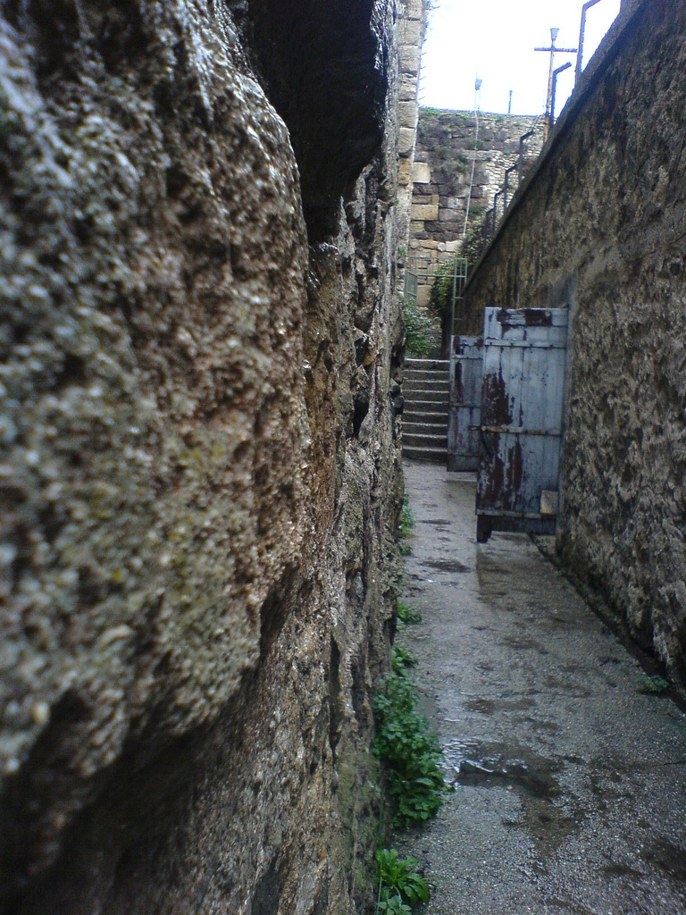 Sinop Cezaevi